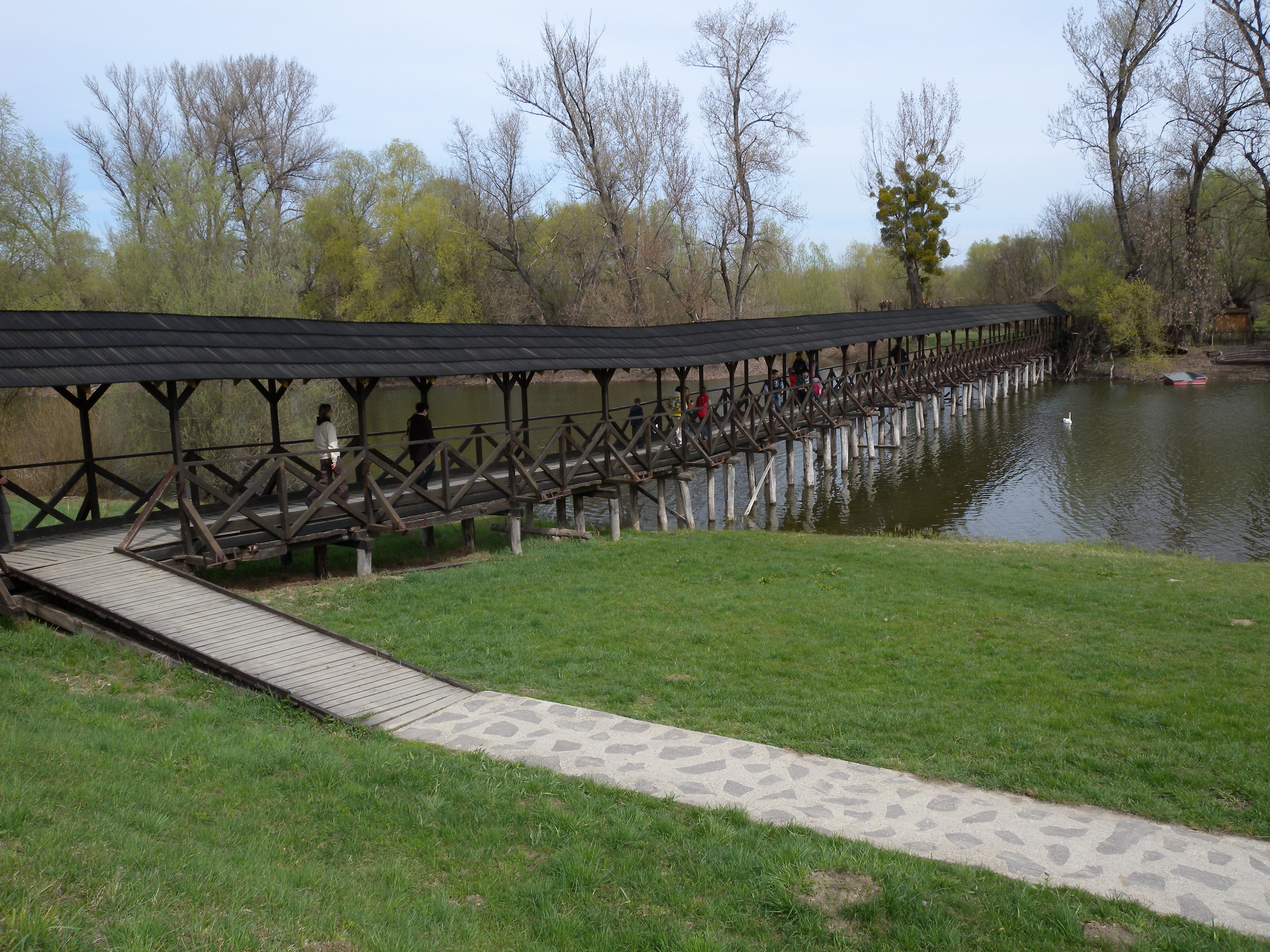 Gyalogos fahíd, Gúta, Kolárovo